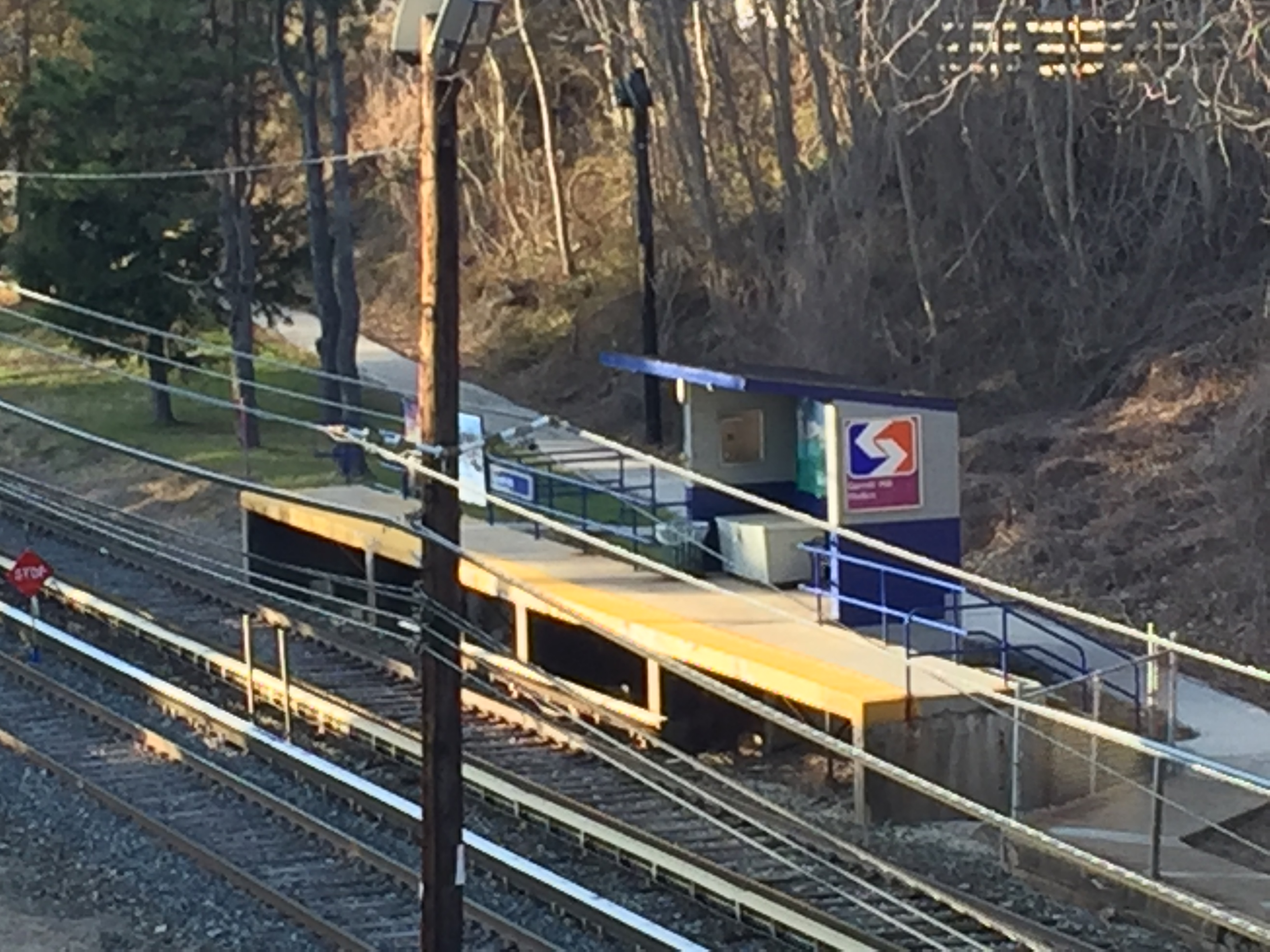 Garrett Hill station 2017